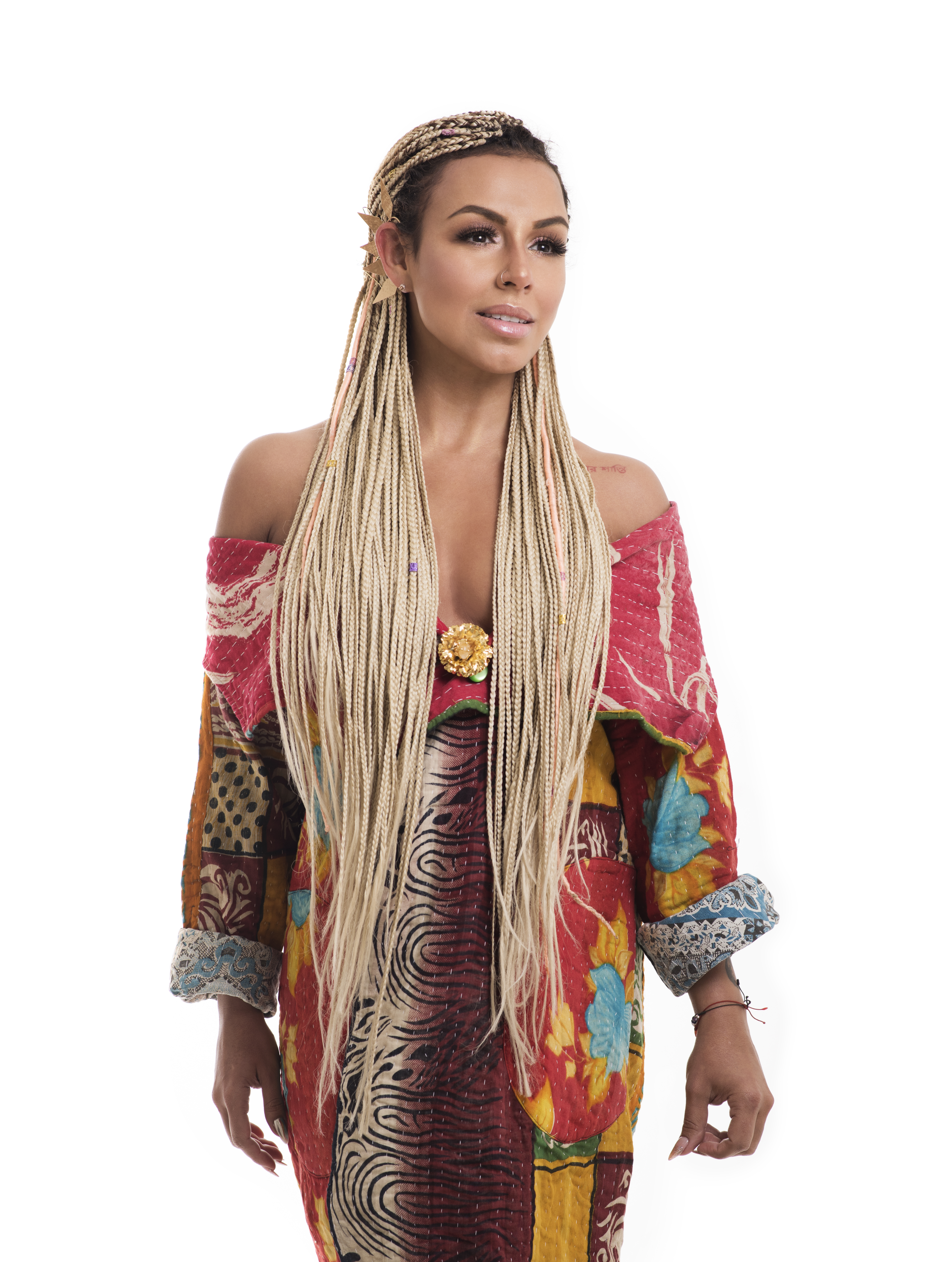 maia musical